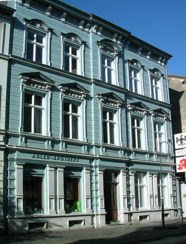 Eschweiler, Adler-Apotheke